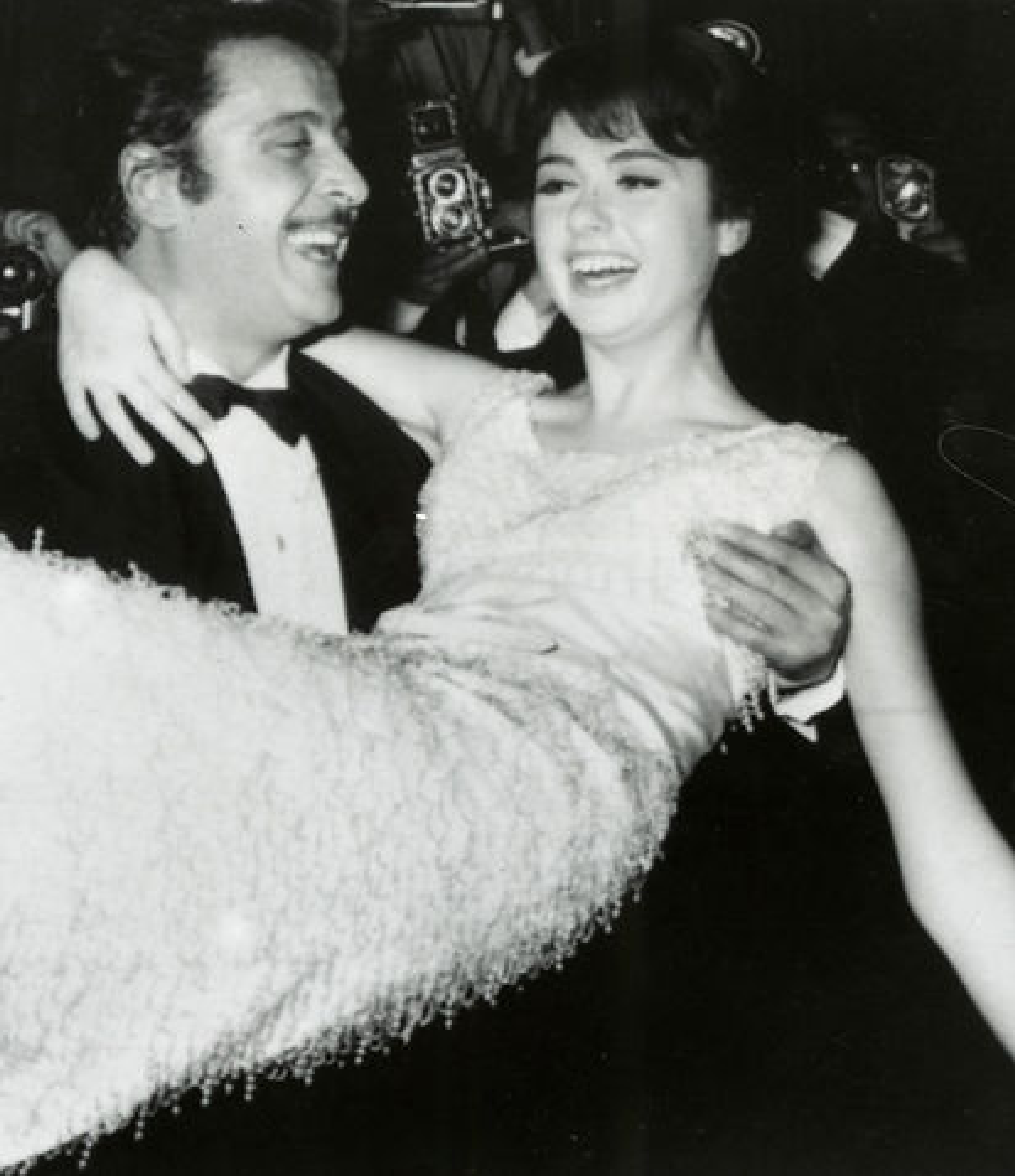 I cantanti Domenico Modugno e Gigliola Cinquetti, vincitori del Festival di Sanremo 1966 con la canzone Dio, come ti amo.